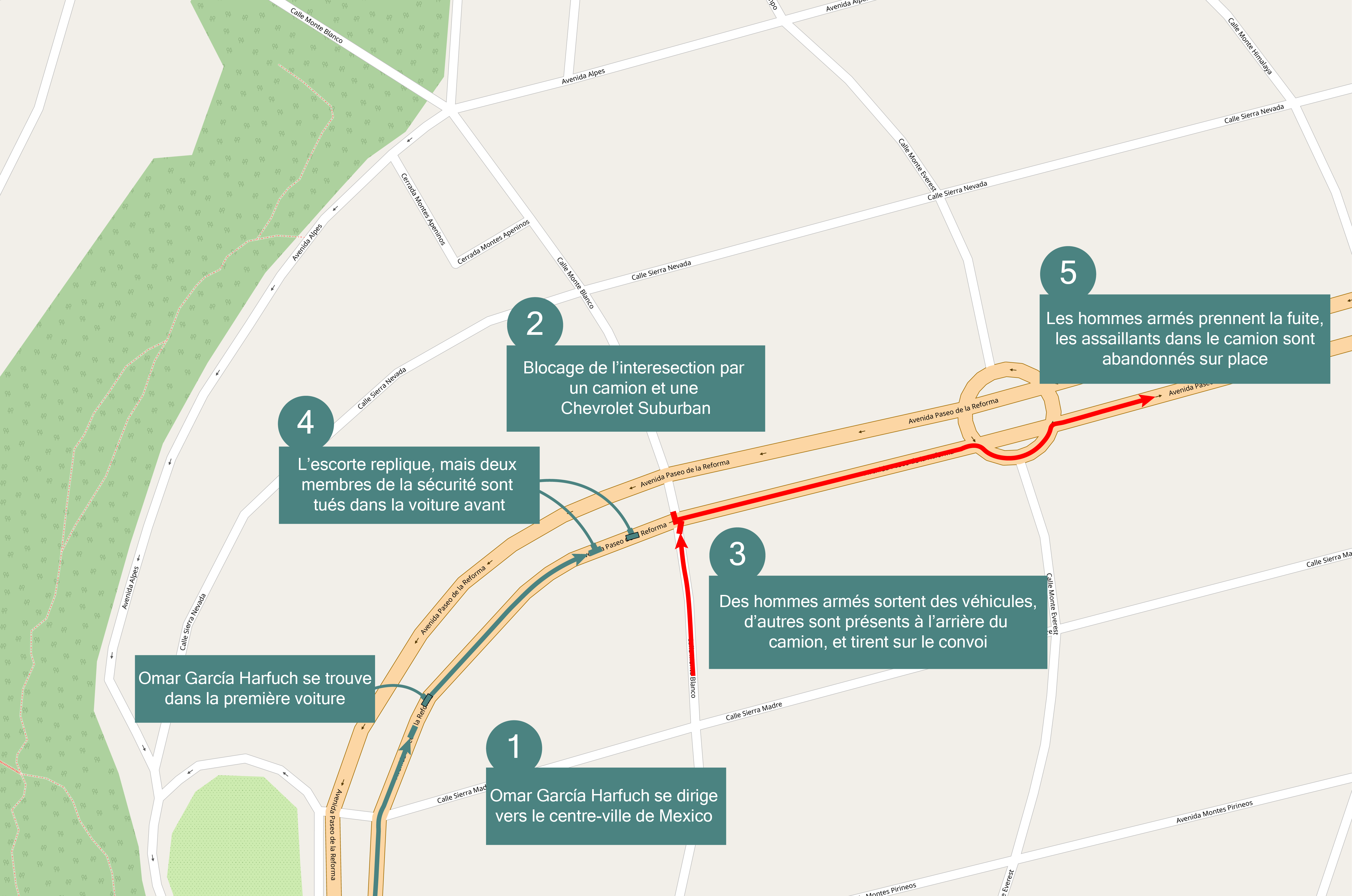 Résumé de l'attaque contre Omar García Harfuch.